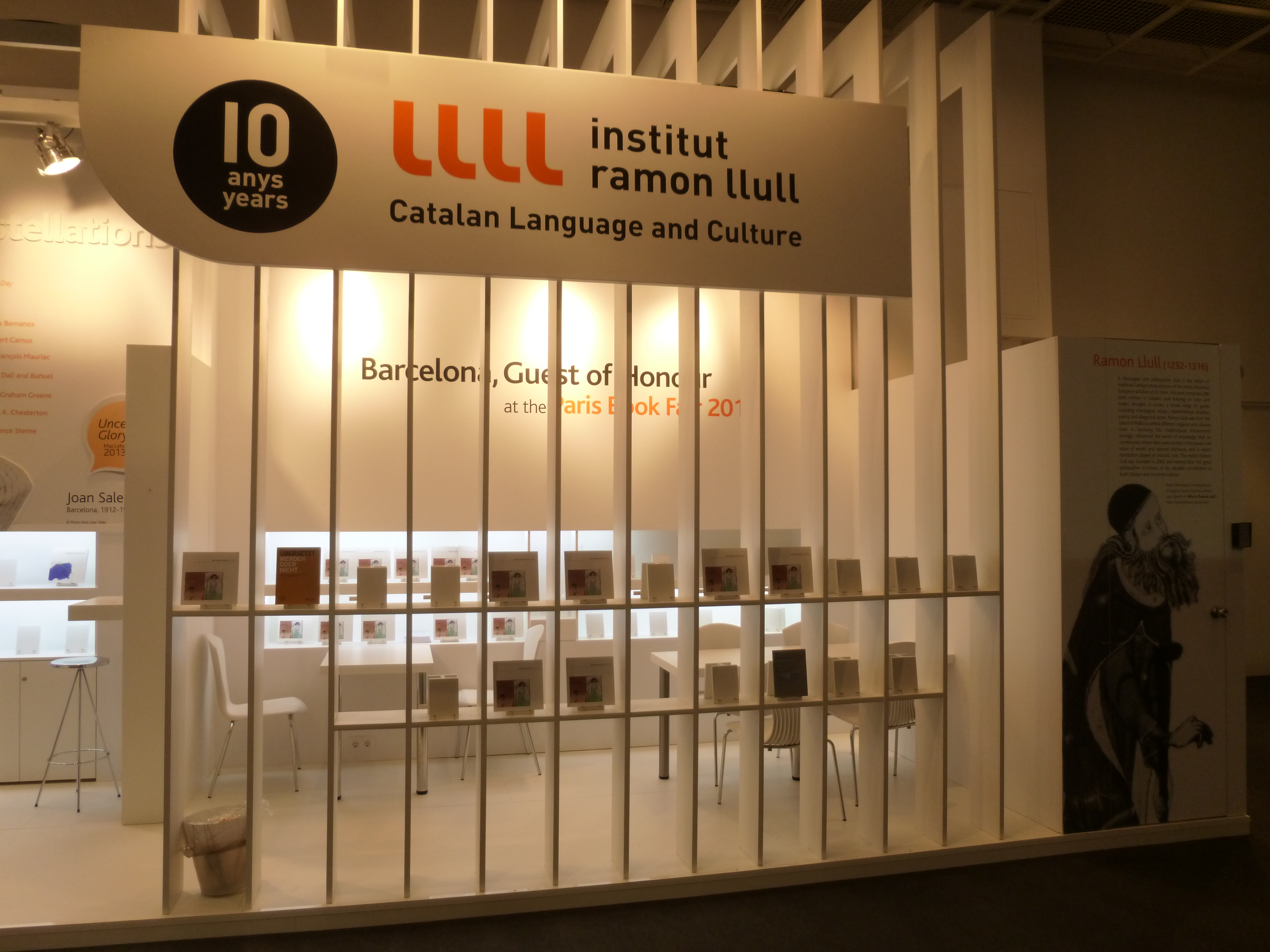 stando de la institucio Institut Ramon Llull pri disvastigo de la kataluna lingvo en la Frankfurta librofoiro 2012